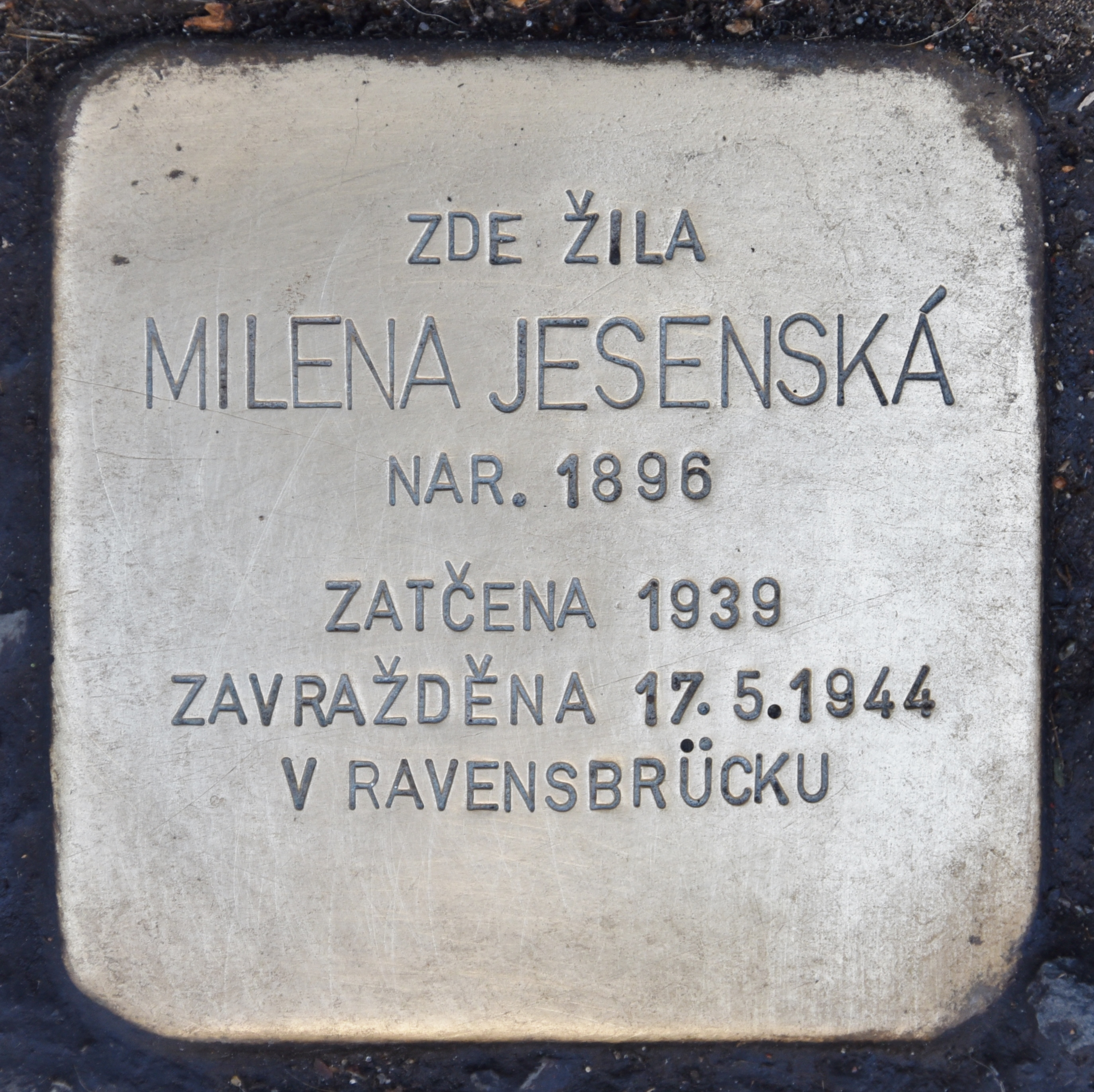 Stolperstein für Milena Jesenska